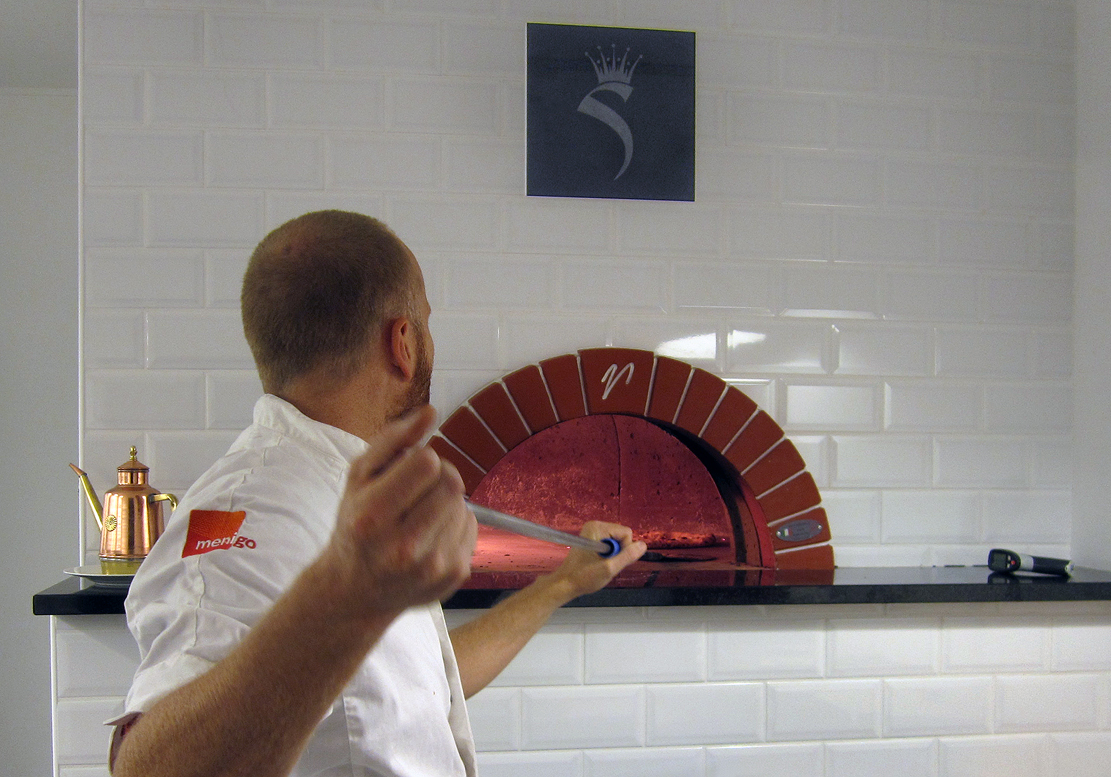 Vedeldad stenugn för bakning av Pizza.